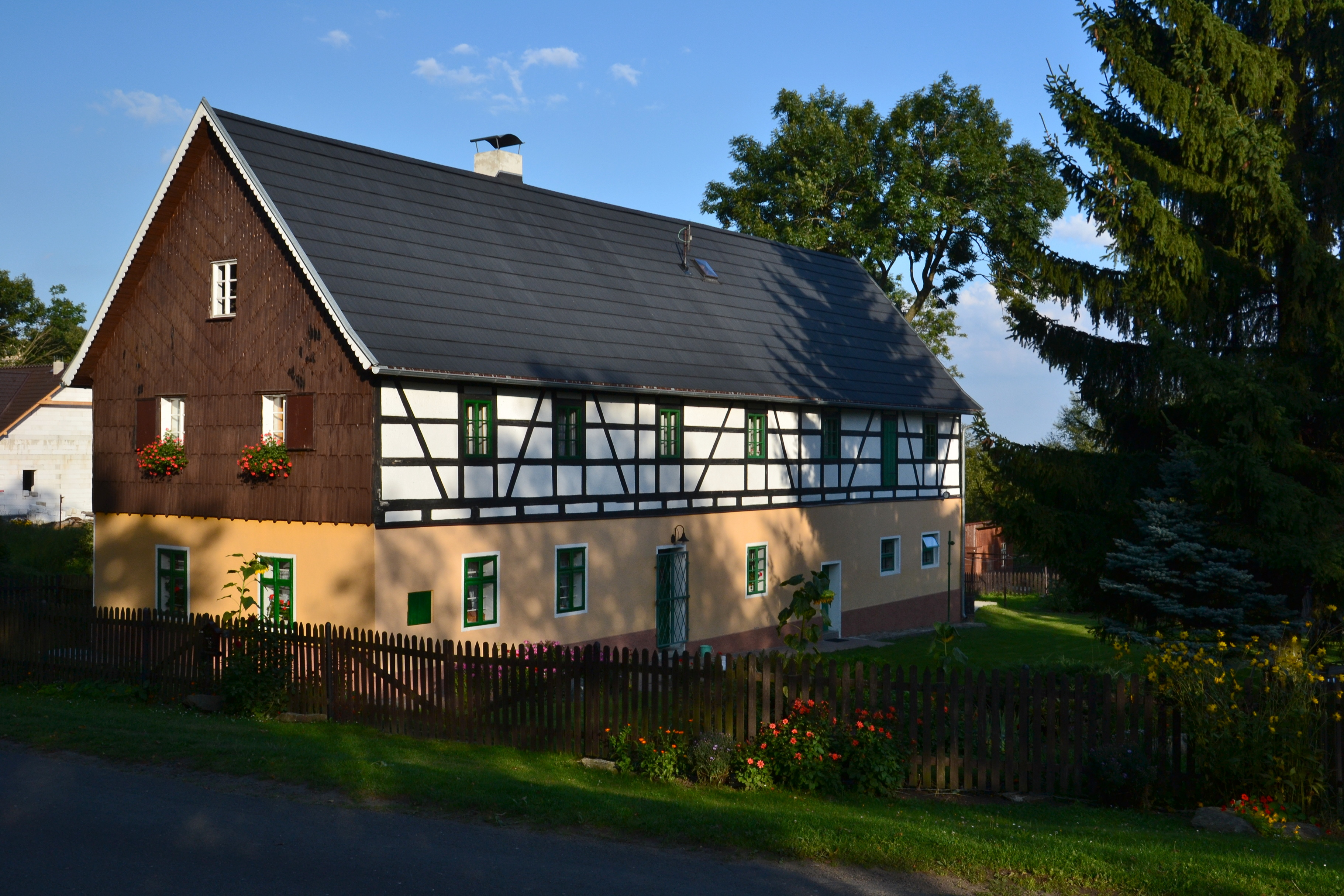 Venkovská usedlost (Květnov), Květnov 11